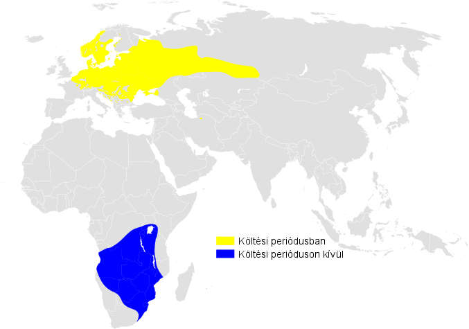 Hippolais icterina distribution map, based on